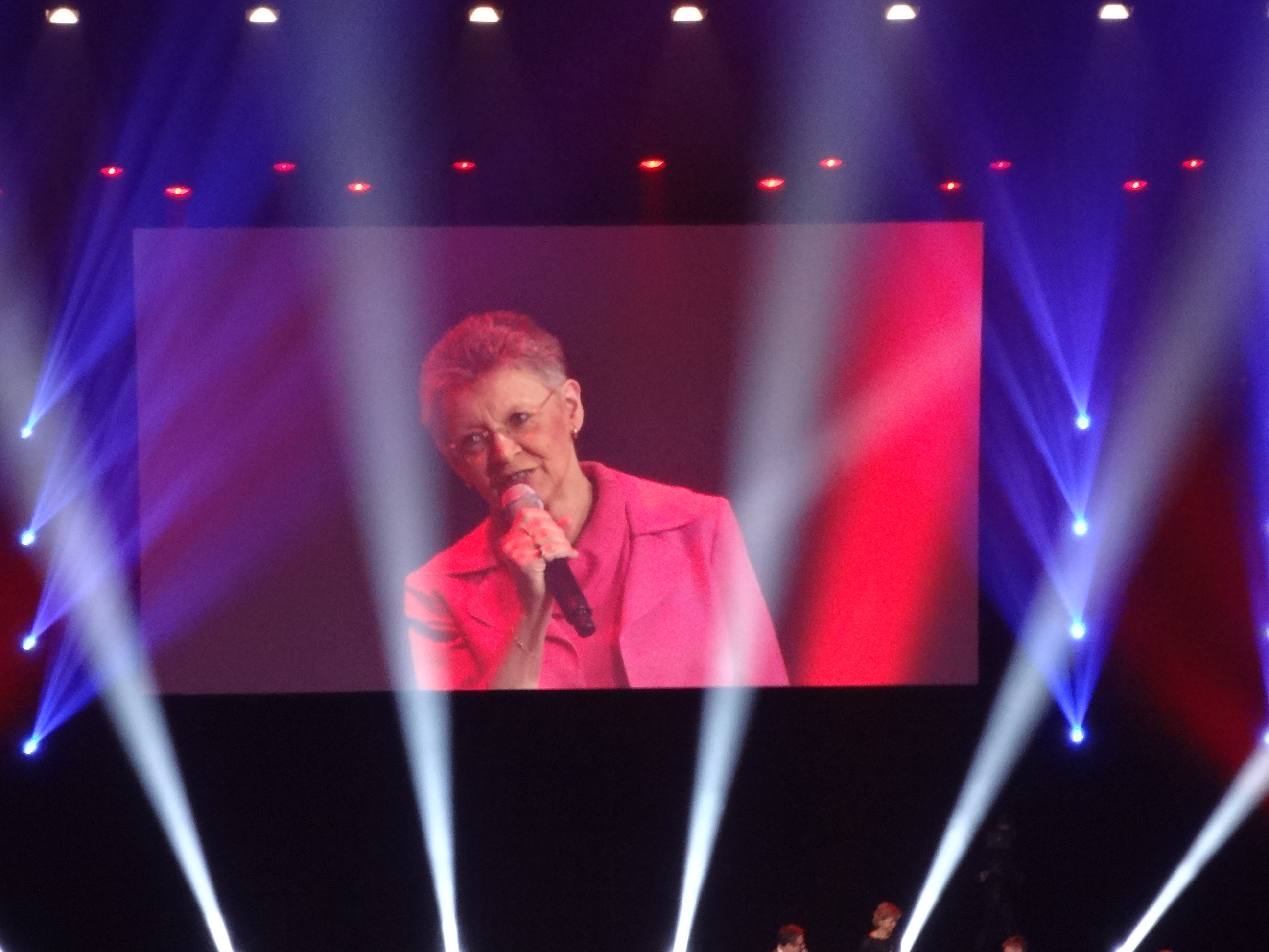 Françoise Barré-Sinoussi lors de la réception du doctorat honoris causa à l'École polytechnique fédérale de Lausanne le samedi 4 octobre 2014.